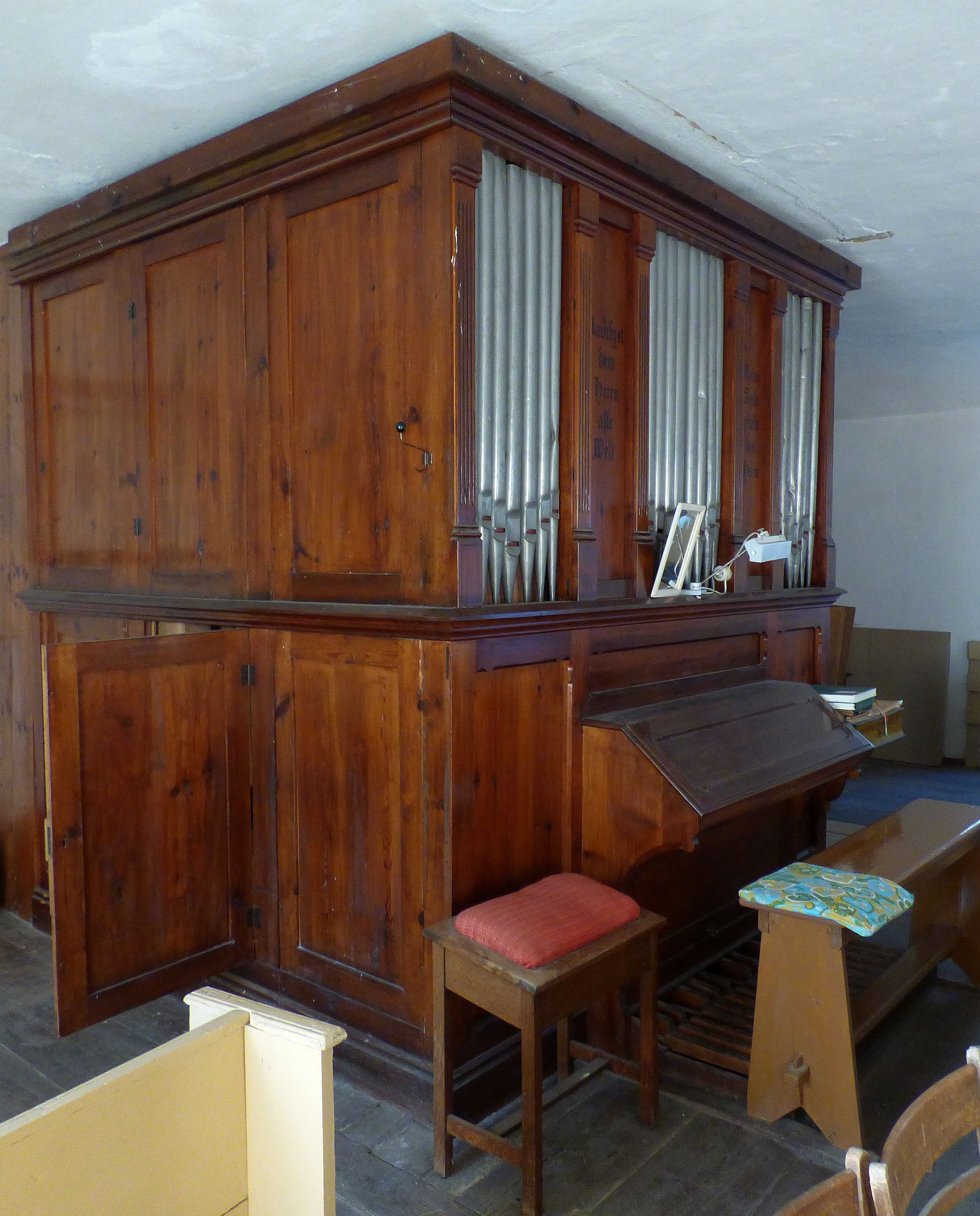 Röver-Orgel aus dem Jahre 1885 in der Dorfkirche Hohenleipisch